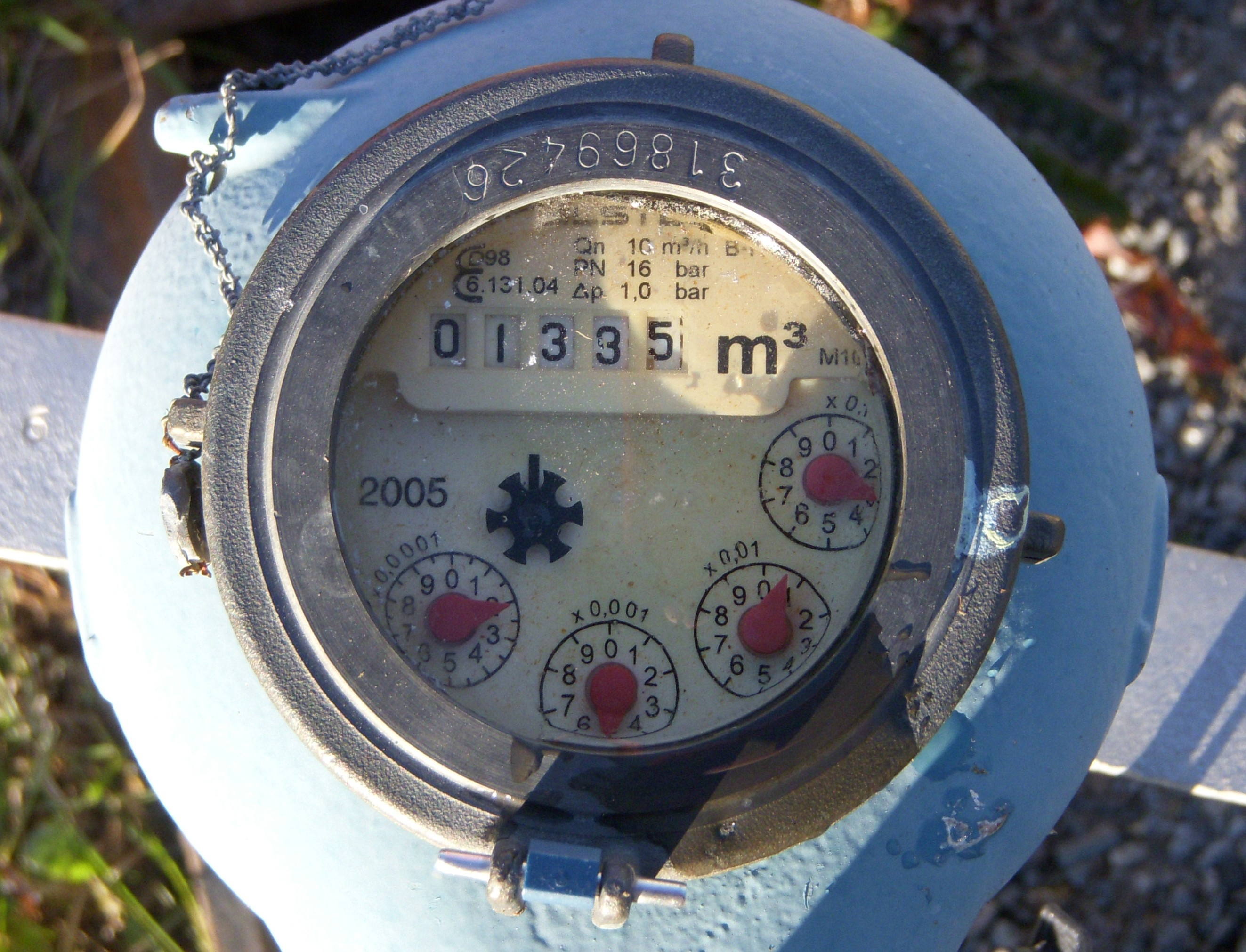 Svensk vattenmätare, skalan